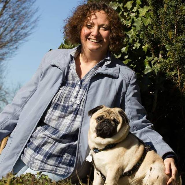 Susanne Oswald mit Hund Töps